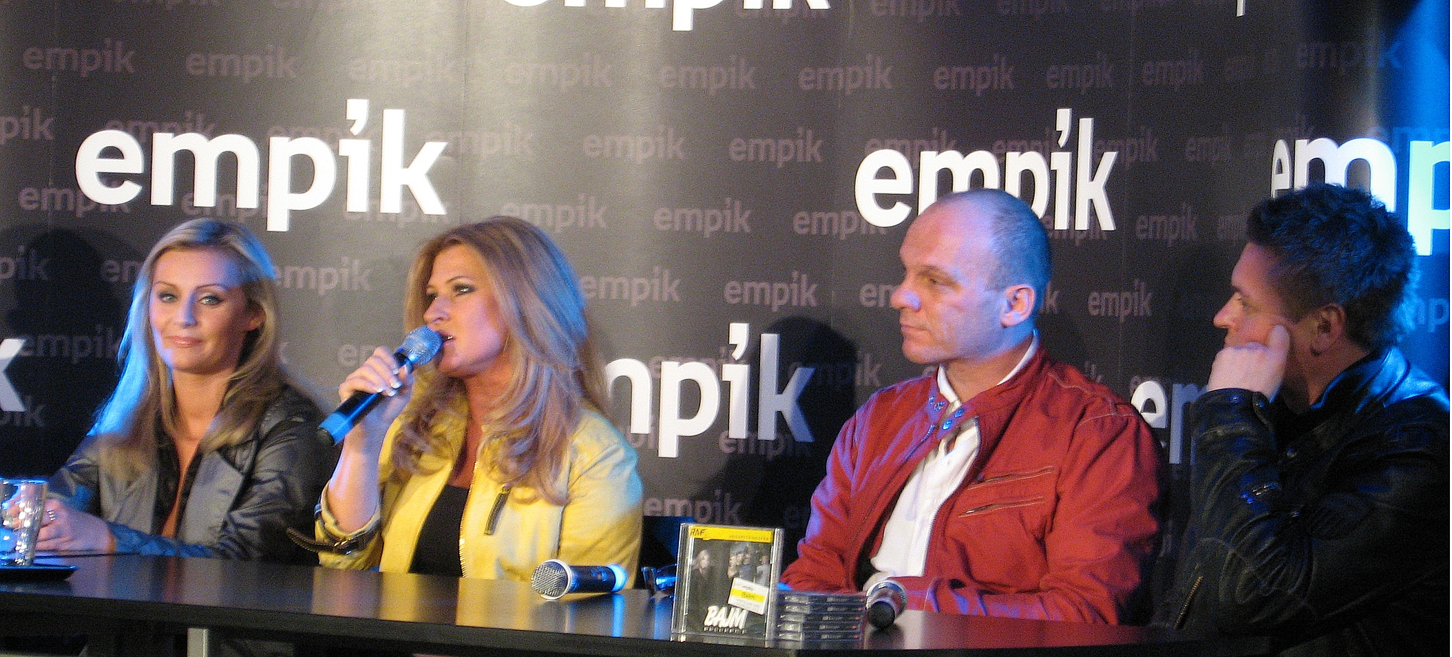 Zespół Bajm podpisuje swoją najnowszą płytę Ballady 2 w Salonie Empik Junior w Warszawie (7 kwietnia 2008).